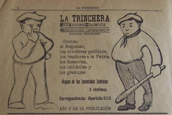 Dibujo en el semanario jaimista "La Trinchera"